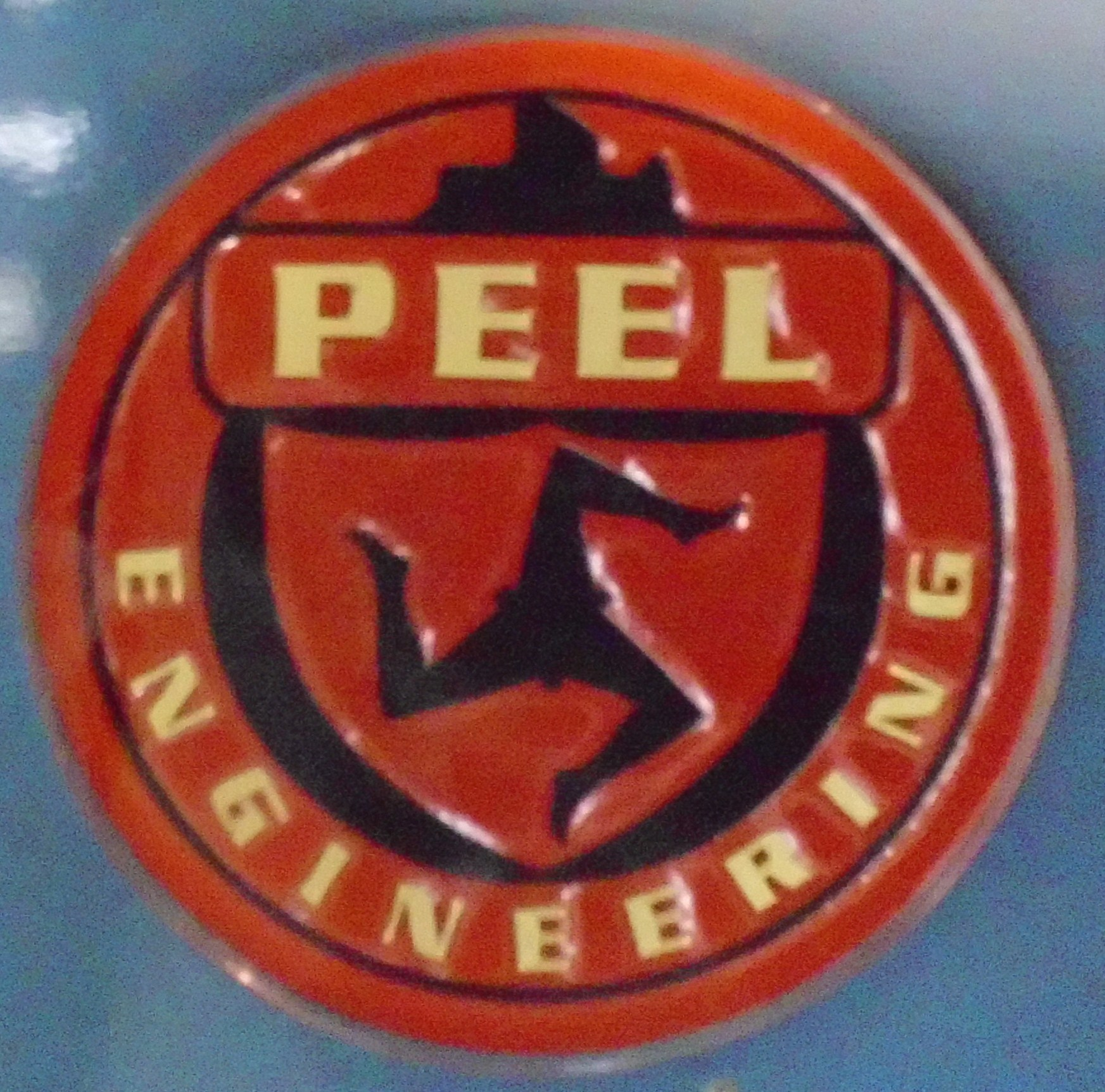 Emblem Peel